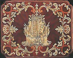 Tavolino di Pietro Piffetti fabbricato per il barone Rehbinder.